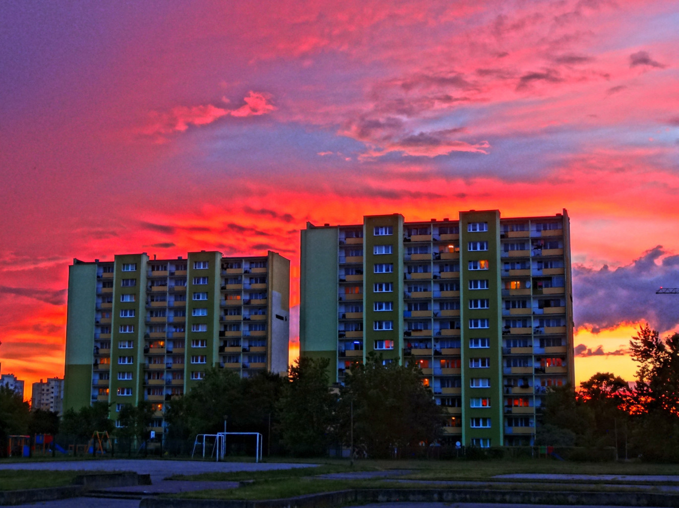 Osiedle Wzgórze Wolności w Bydgoszczy w wieczornej zorzy